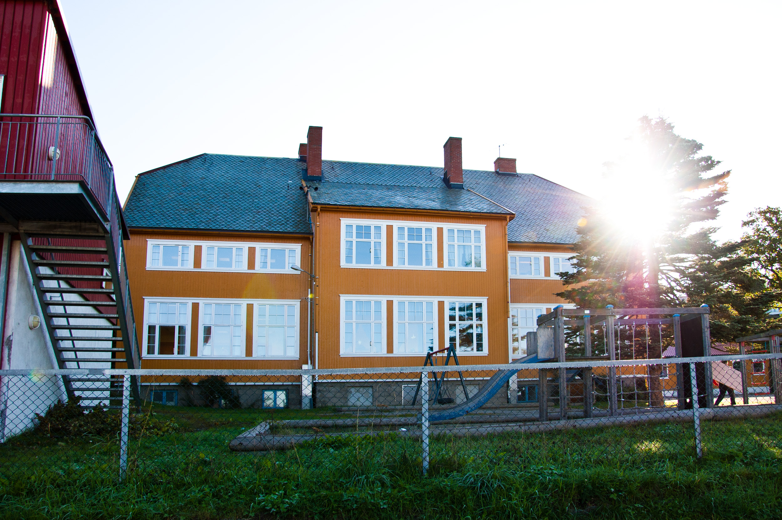 Framnes skole, barneskole i Sandefjord